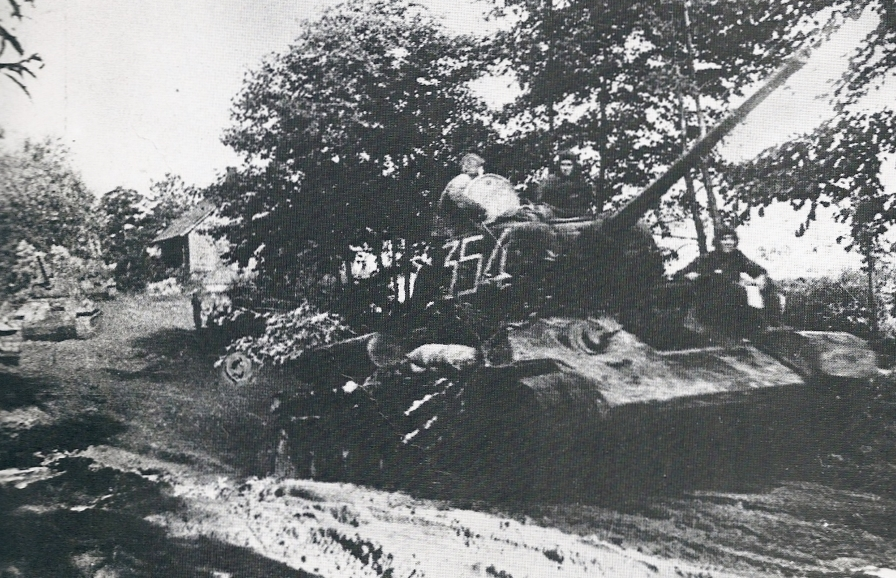 Carri T-34/85 del 3° Corpo carri durante l'offensiva Lublino-Brest